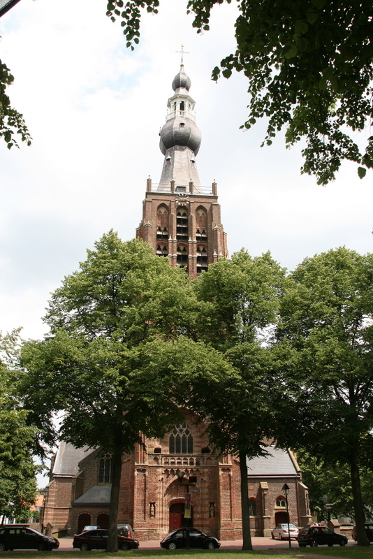 Hilvarenbeek - Vrijthof 28 - St. Petrus-Bandenkerk :Foto genomen vanaf overzijde Vrijthofplantsoen